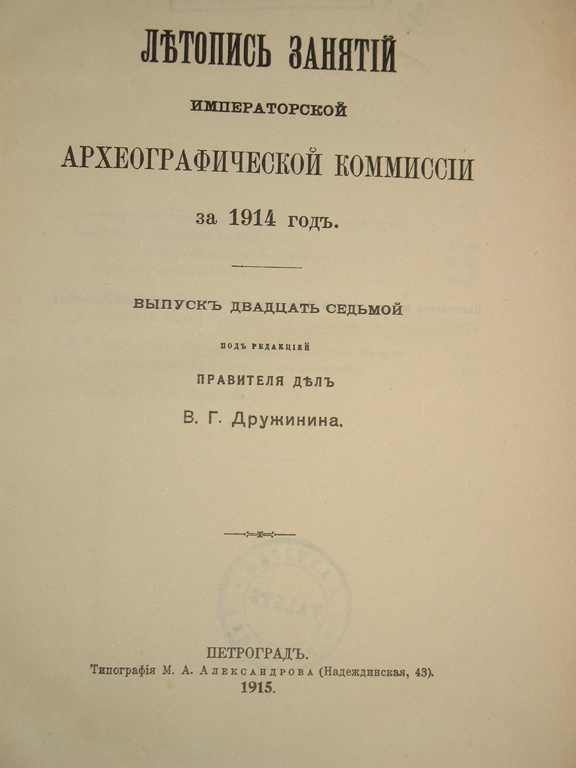 Летопись занятий Археографической комиссии за 1914 год